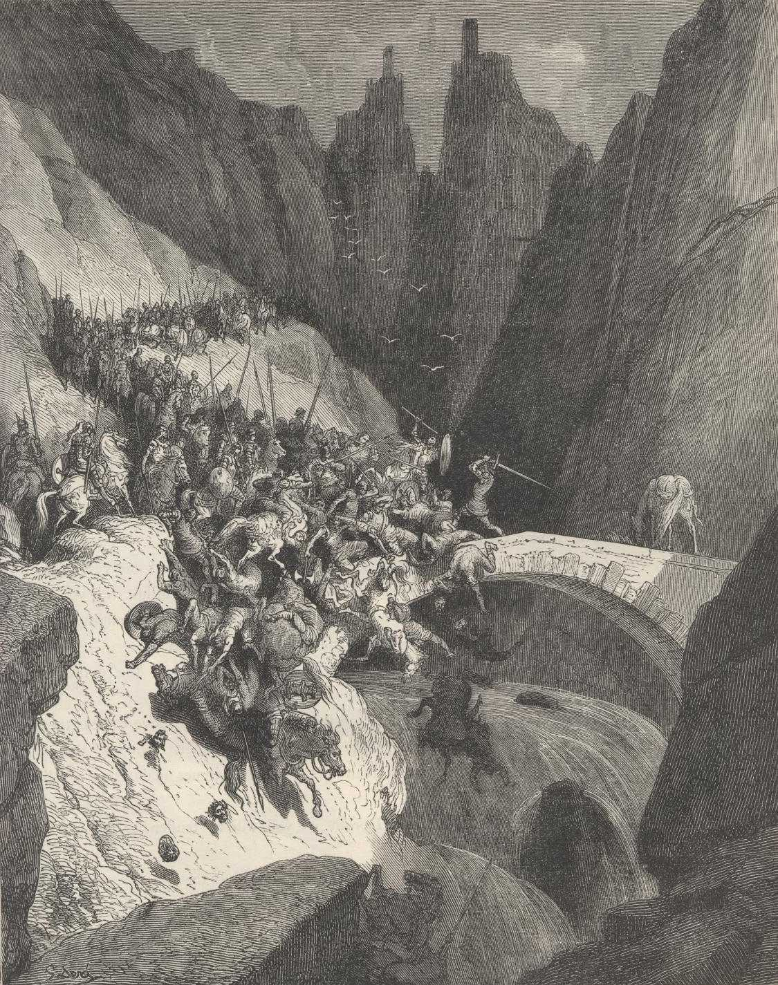 Gustave Doré, ilustração para "Dom Quixote" de Miguel de Cervantes